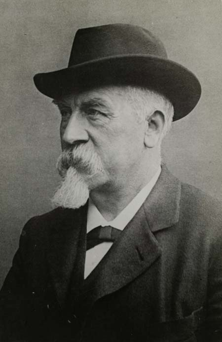 Edouard Remouchamps (1836-1900)